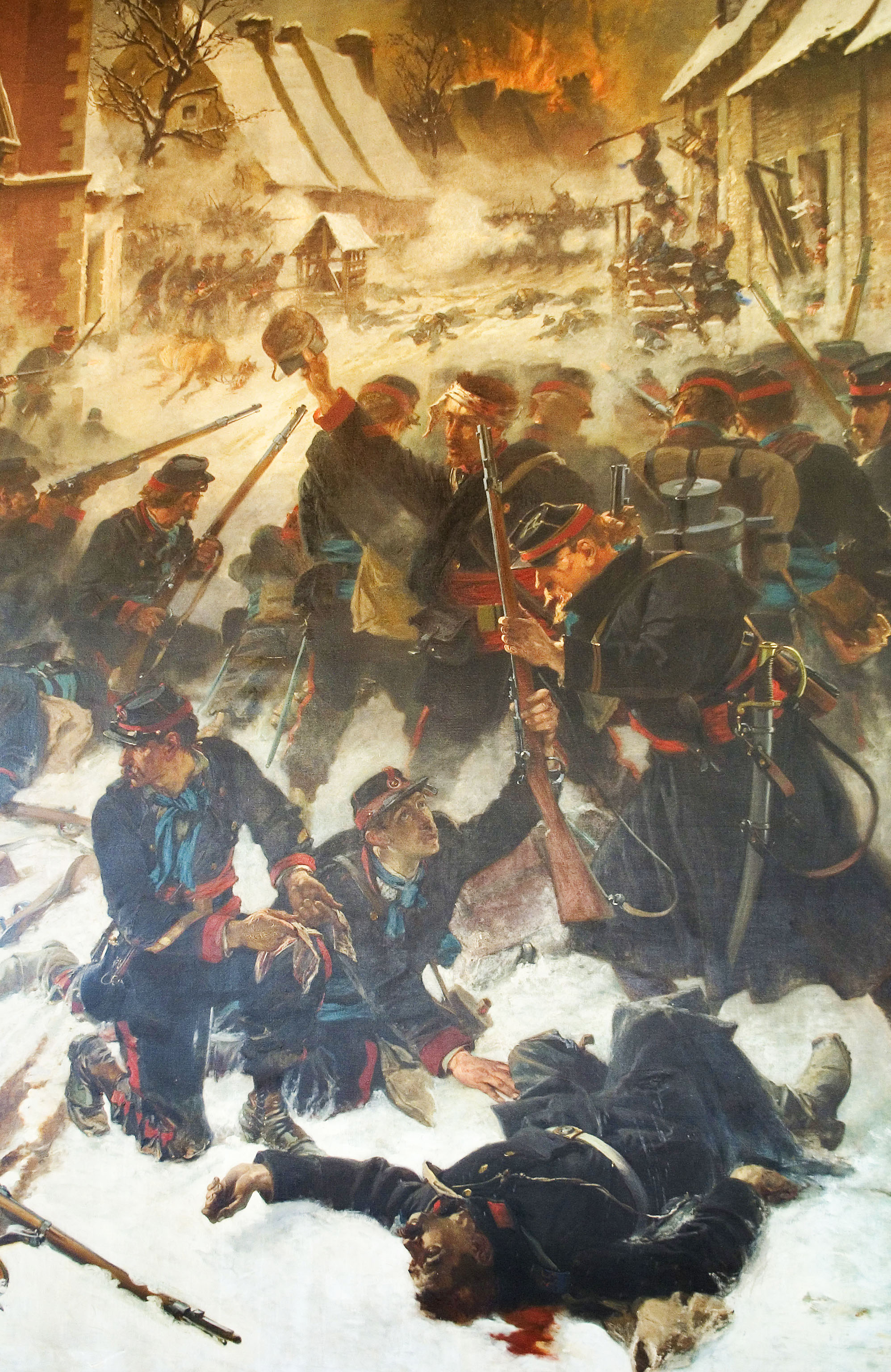 Bapaume extrait du tableau de la bataille de Bapaume